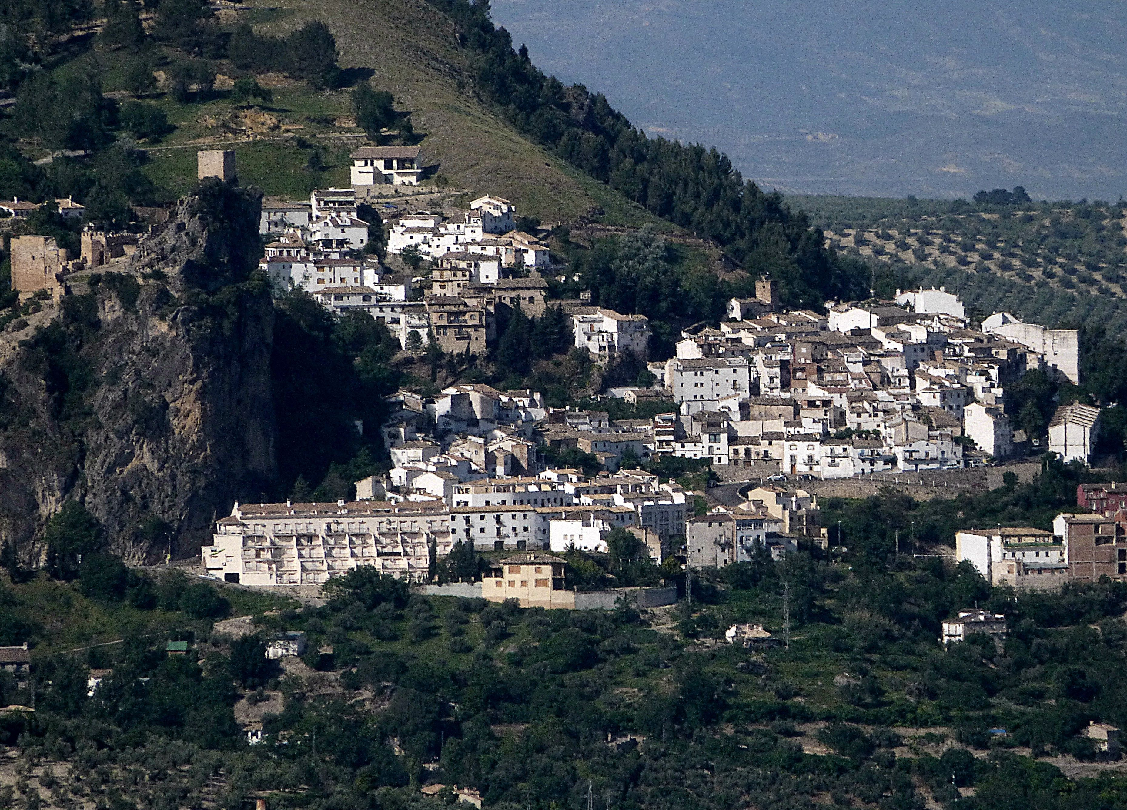 La Iruela mit Castillo